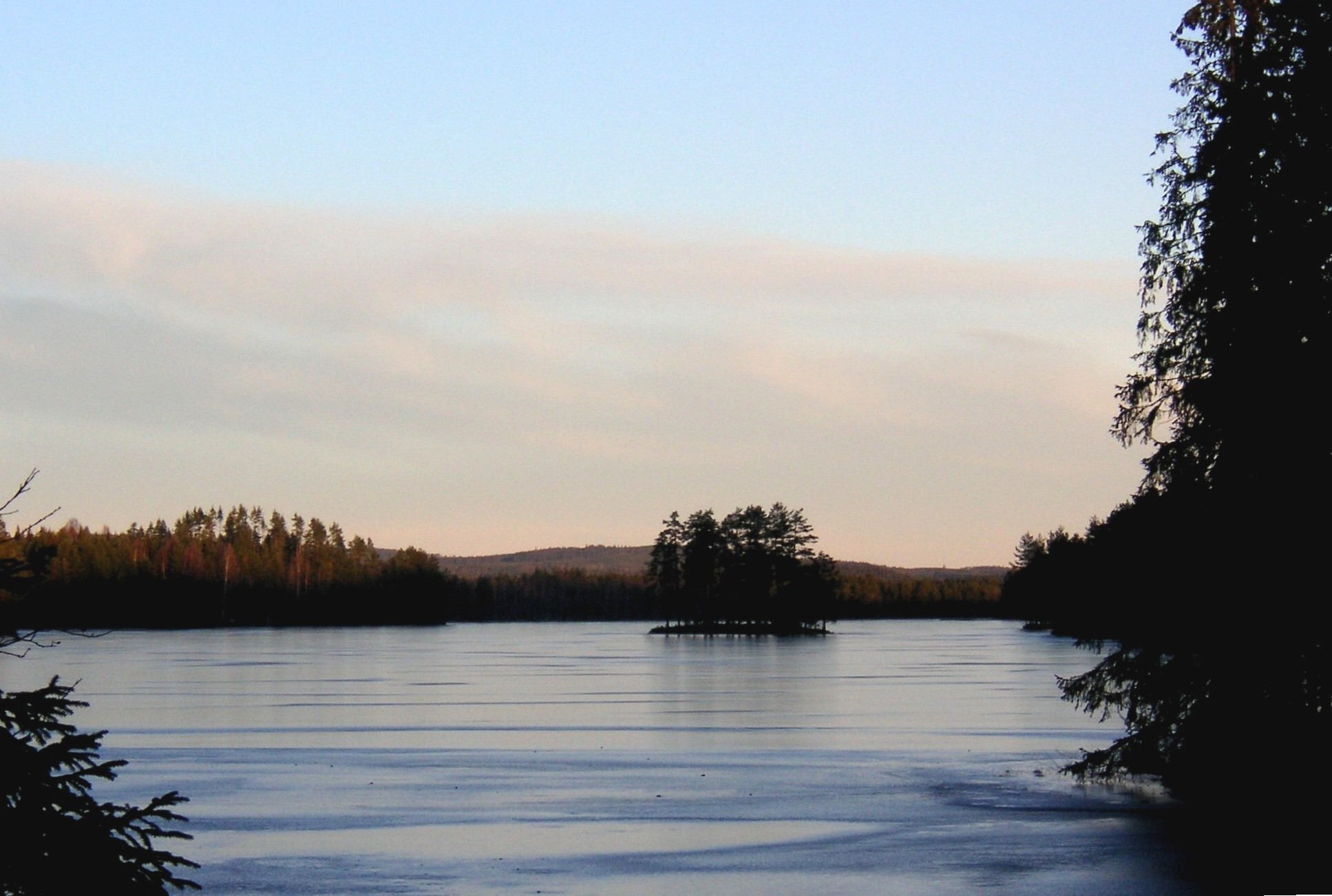 Isen börjar lägga sig på sjön Frötjärnen, Dalarna (vy mot norr)